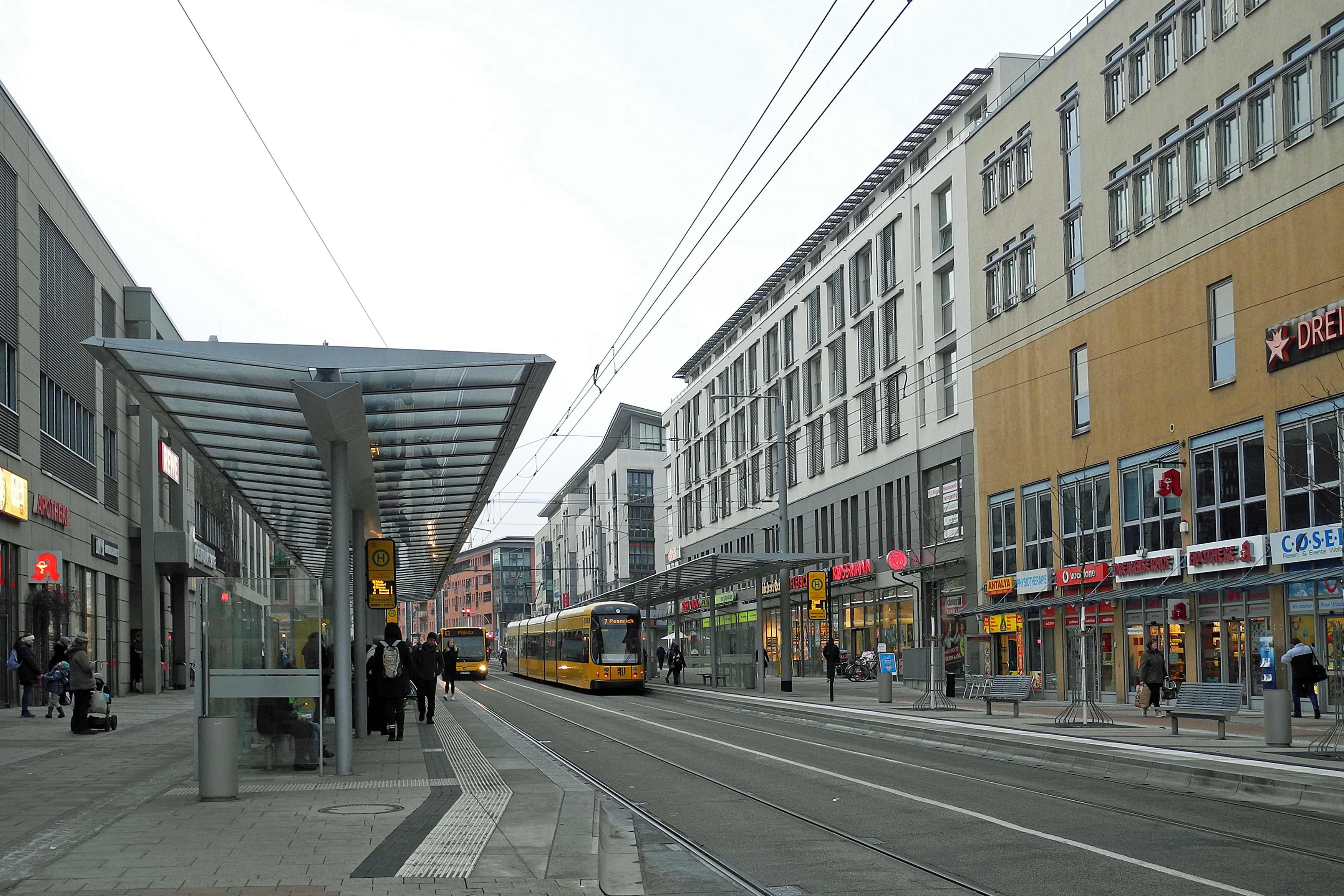 Die neue Zentralhaltestelle in Dresden-Löbtau, Kesselsdorfer Straße